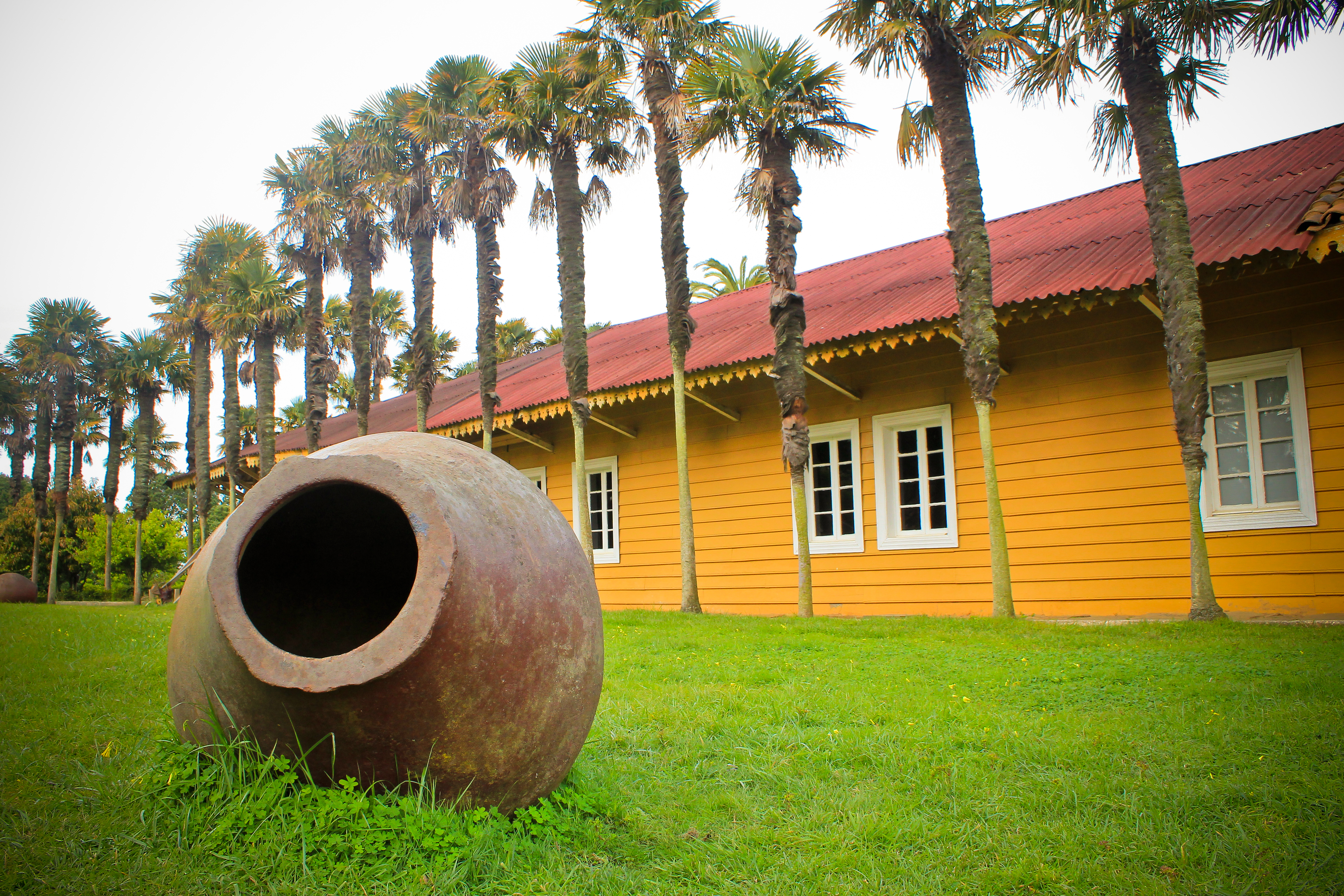 Casas patronales y Parque Fundo Hualpén This is a photo of a national monument in Chile: 650